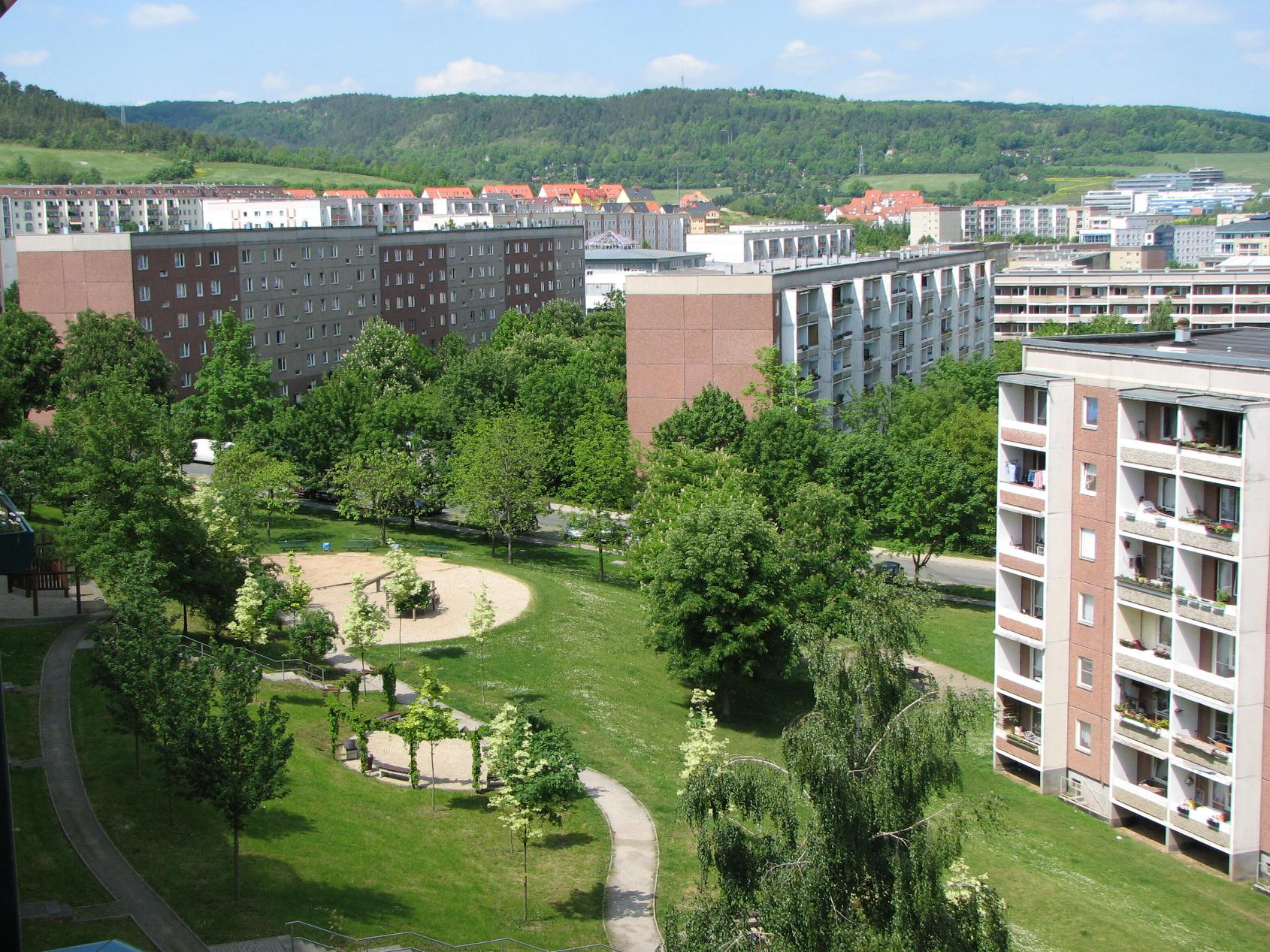 Wohnblocks und Grünflächen in Winzerla (Jena/Thüringen/Germany)